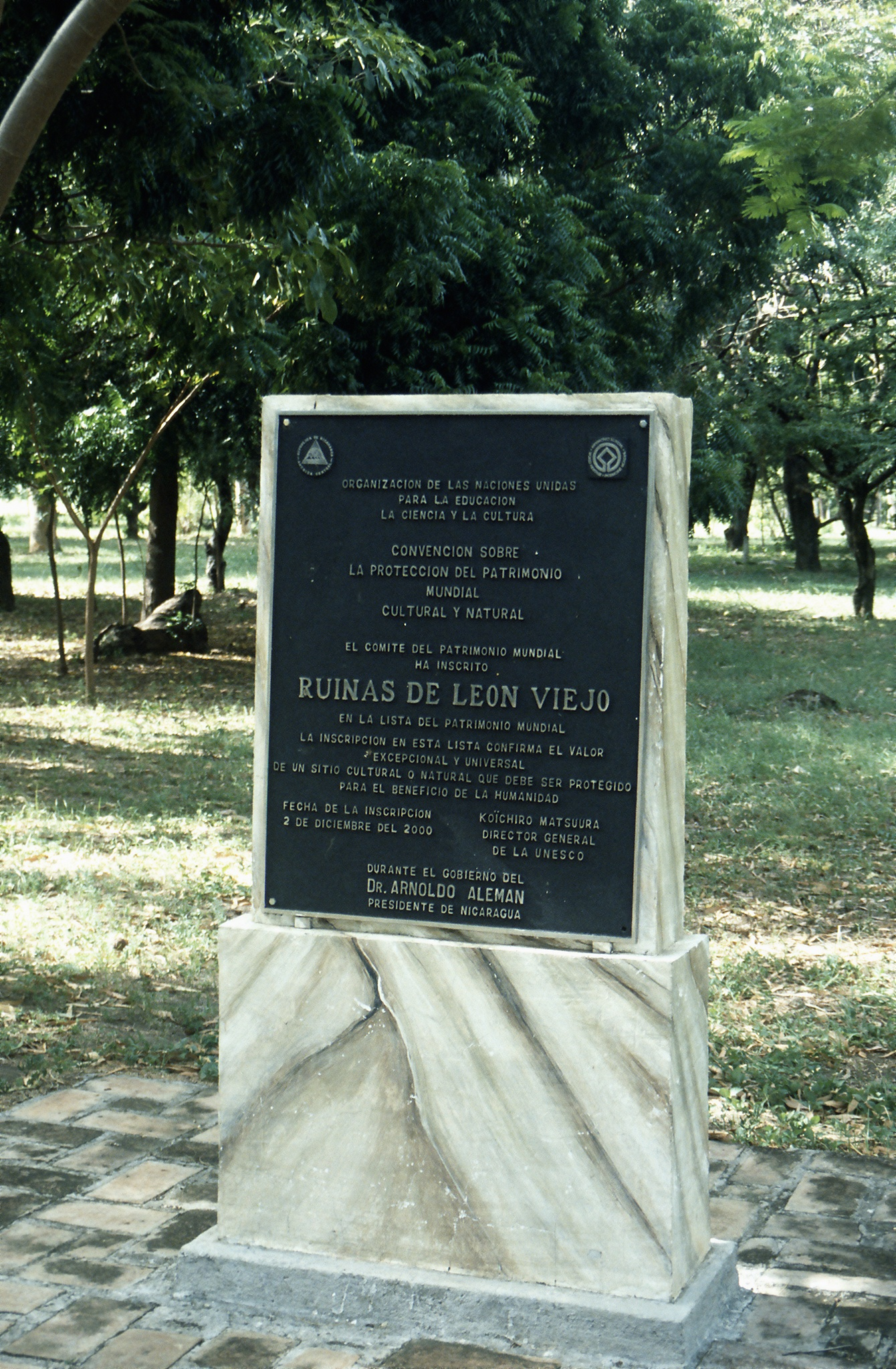 Ruinen des alten Leons in Nicaragua, Widmung als Weltkulturerbe